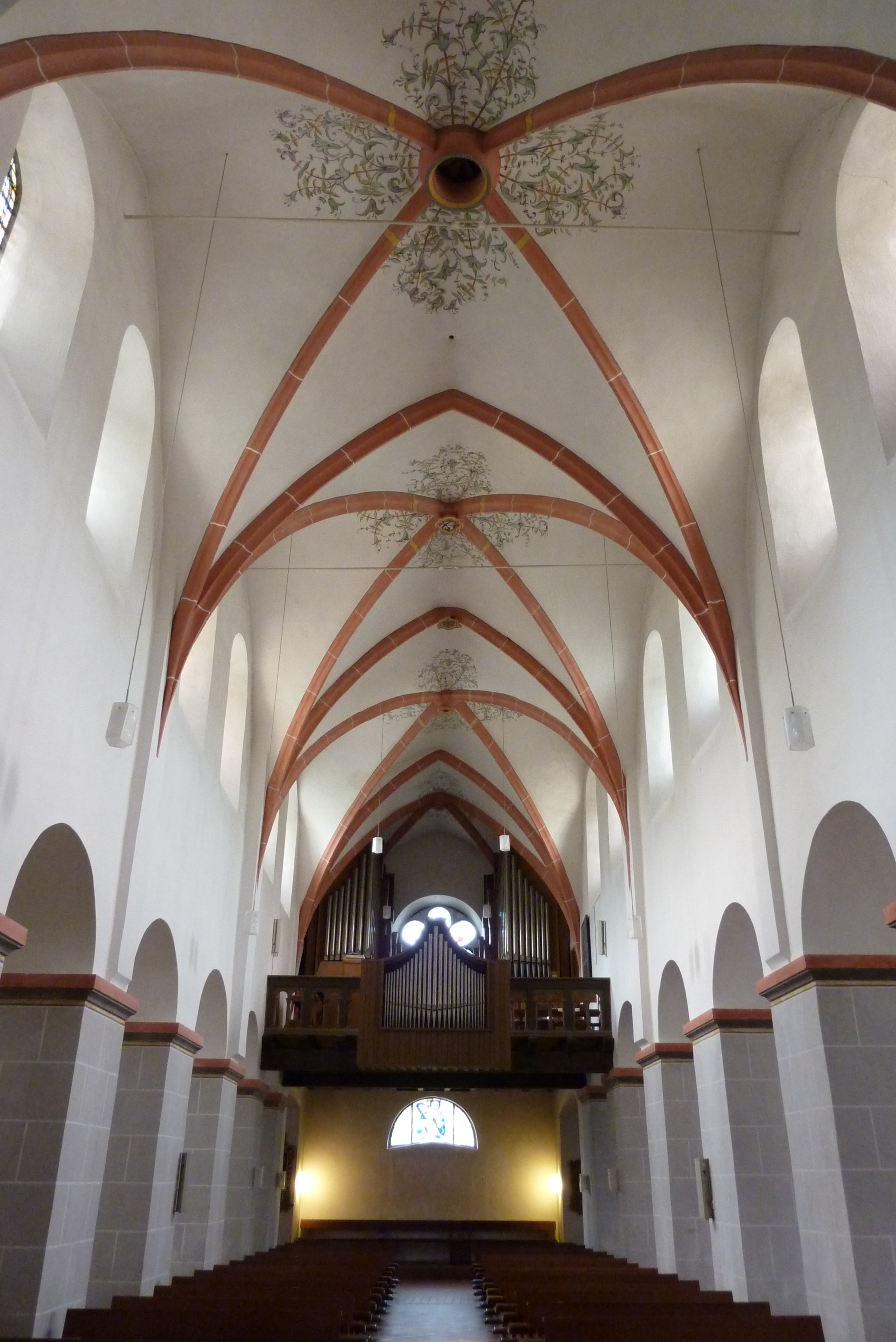 katholische Pfarrkirche Mariä Verkündigung in Altenahr, Innenraum: Blick zur Orgelempore